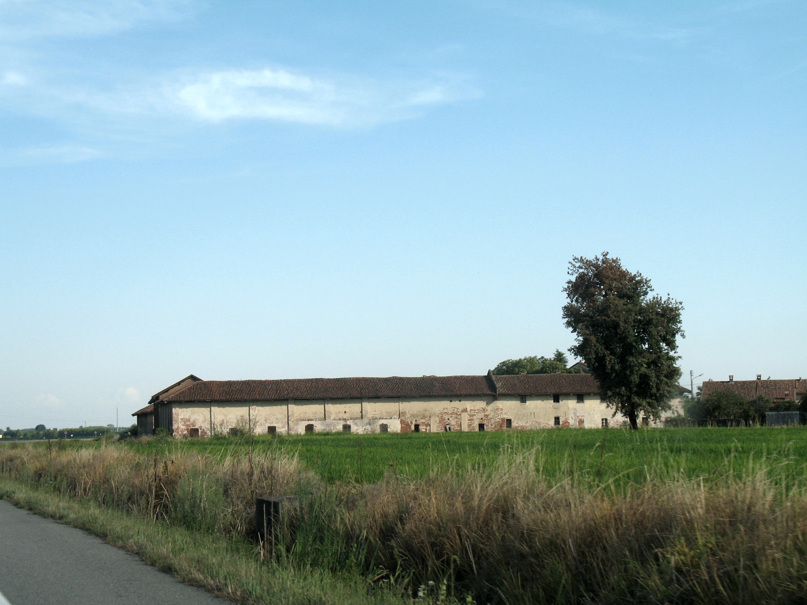 Nostra immagine Podere nella piana di Casale Monferrato